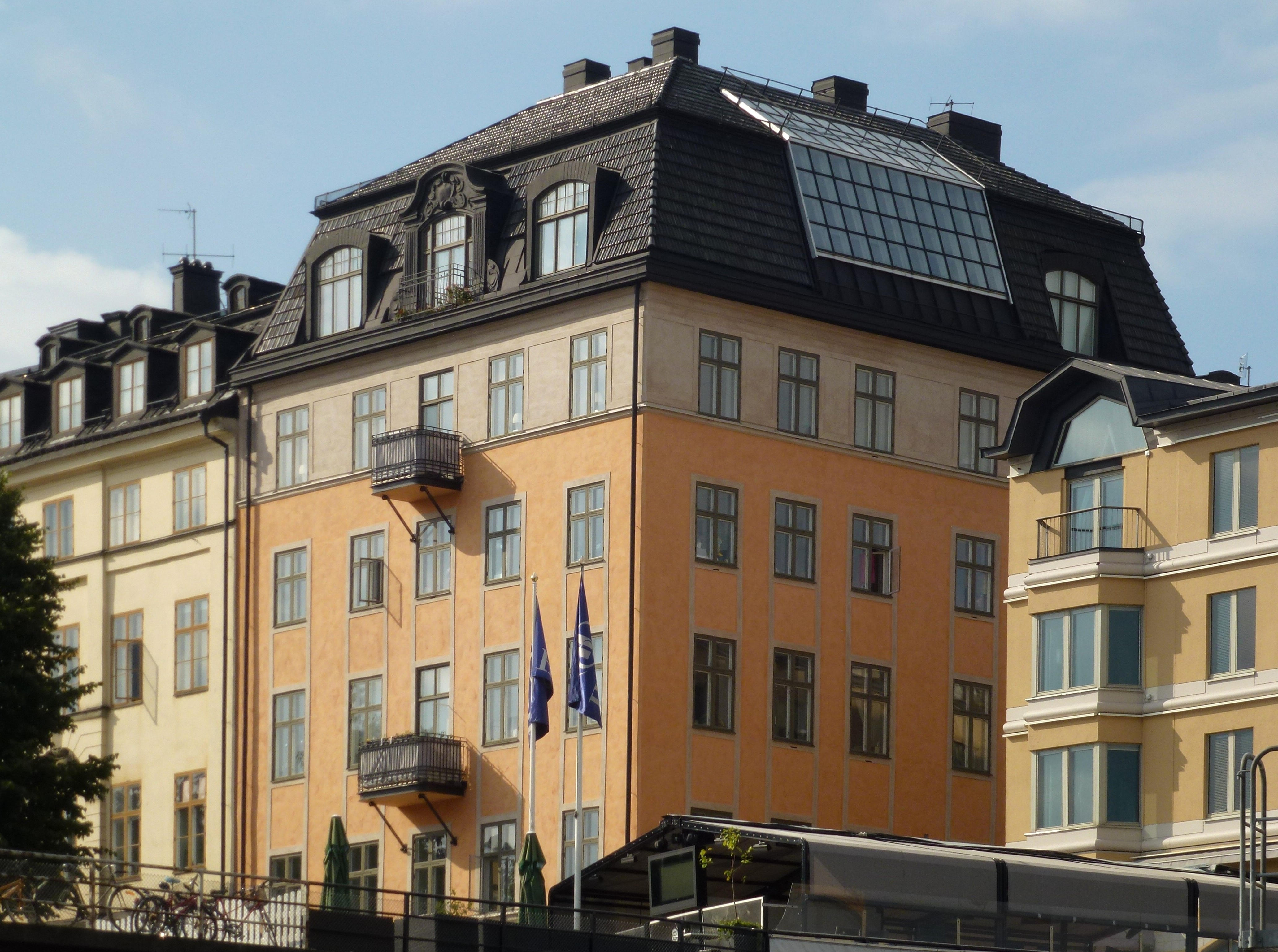 Johan Skyttes hus, Södermalnstorg 4